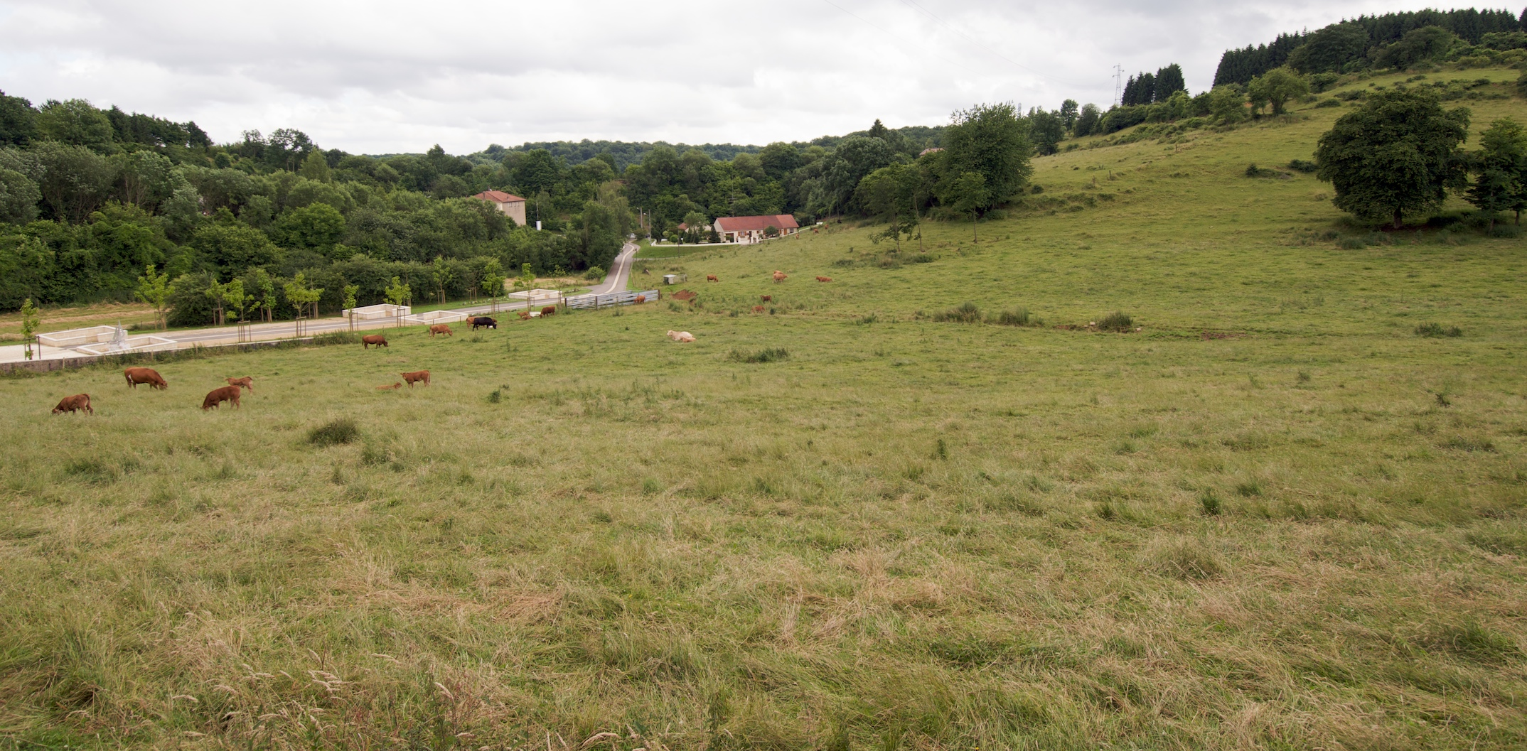 KZ-Niewelager Thil: Plaz, wou am Krich d'Lager stoung